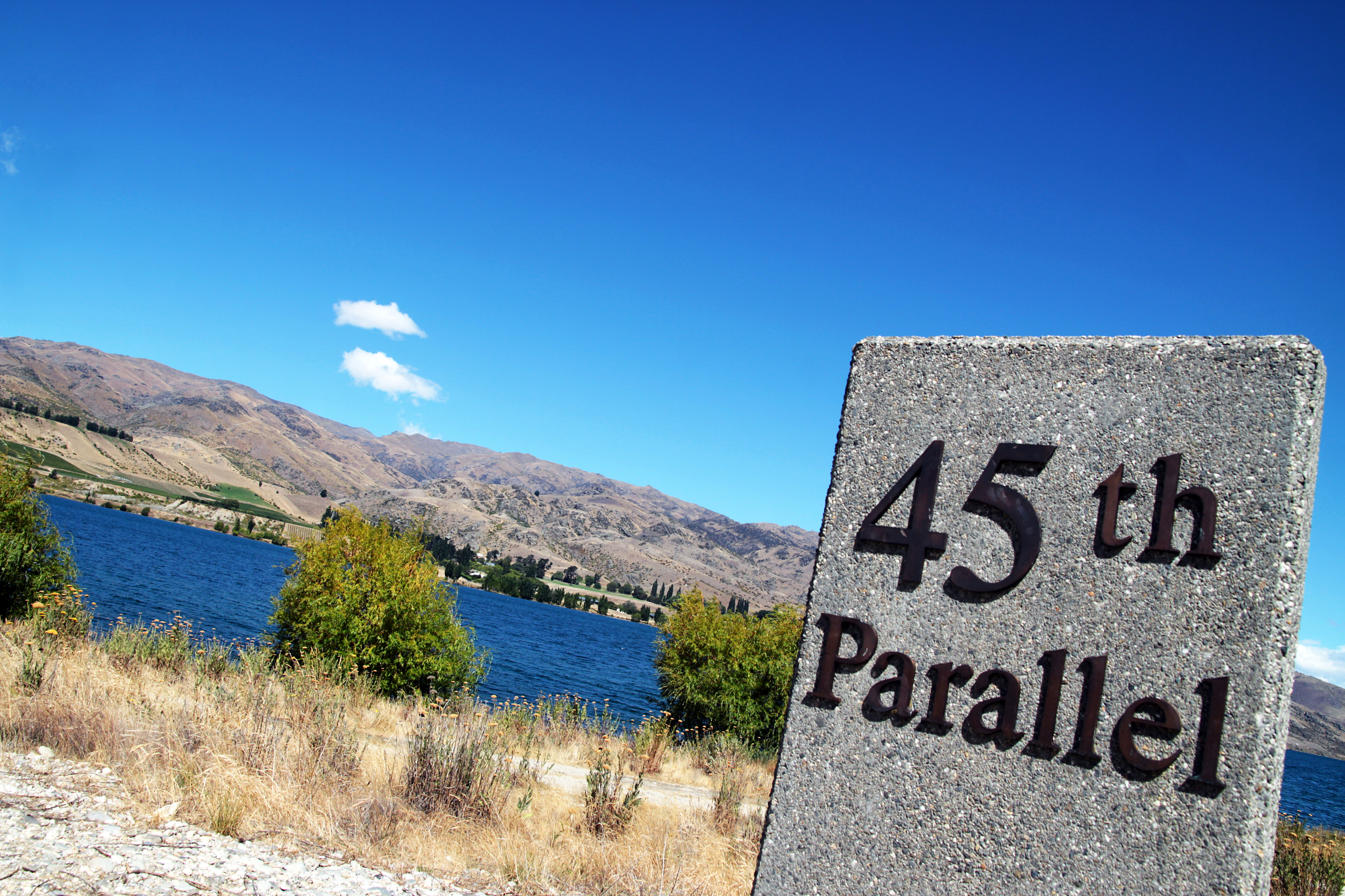 45eme parallele dans l'hémisphère Sud, entre Queenstown et Wanaka